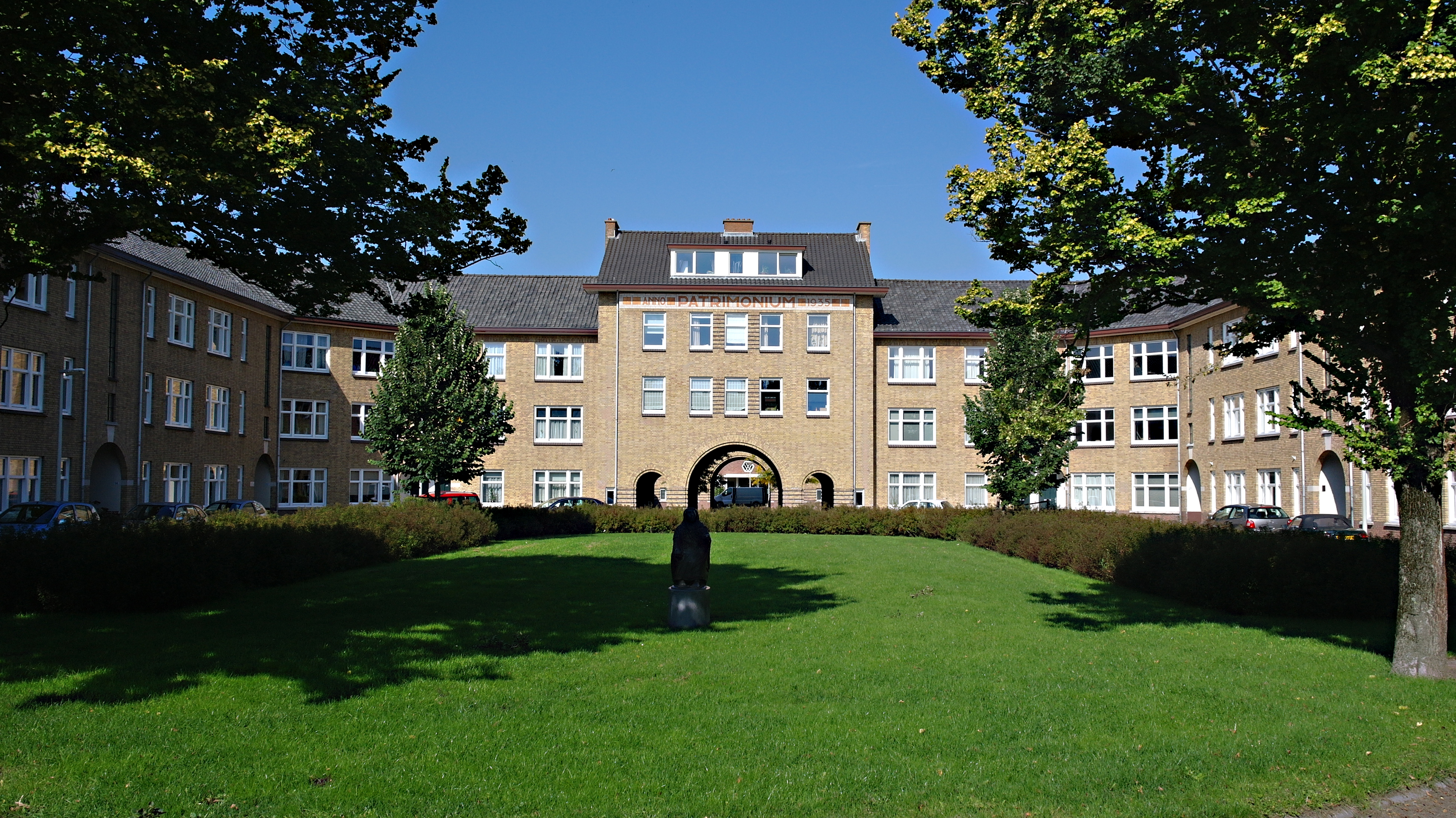 In 2011 gerenoveerde woningen aan het Esmoreitplein te Den Haag